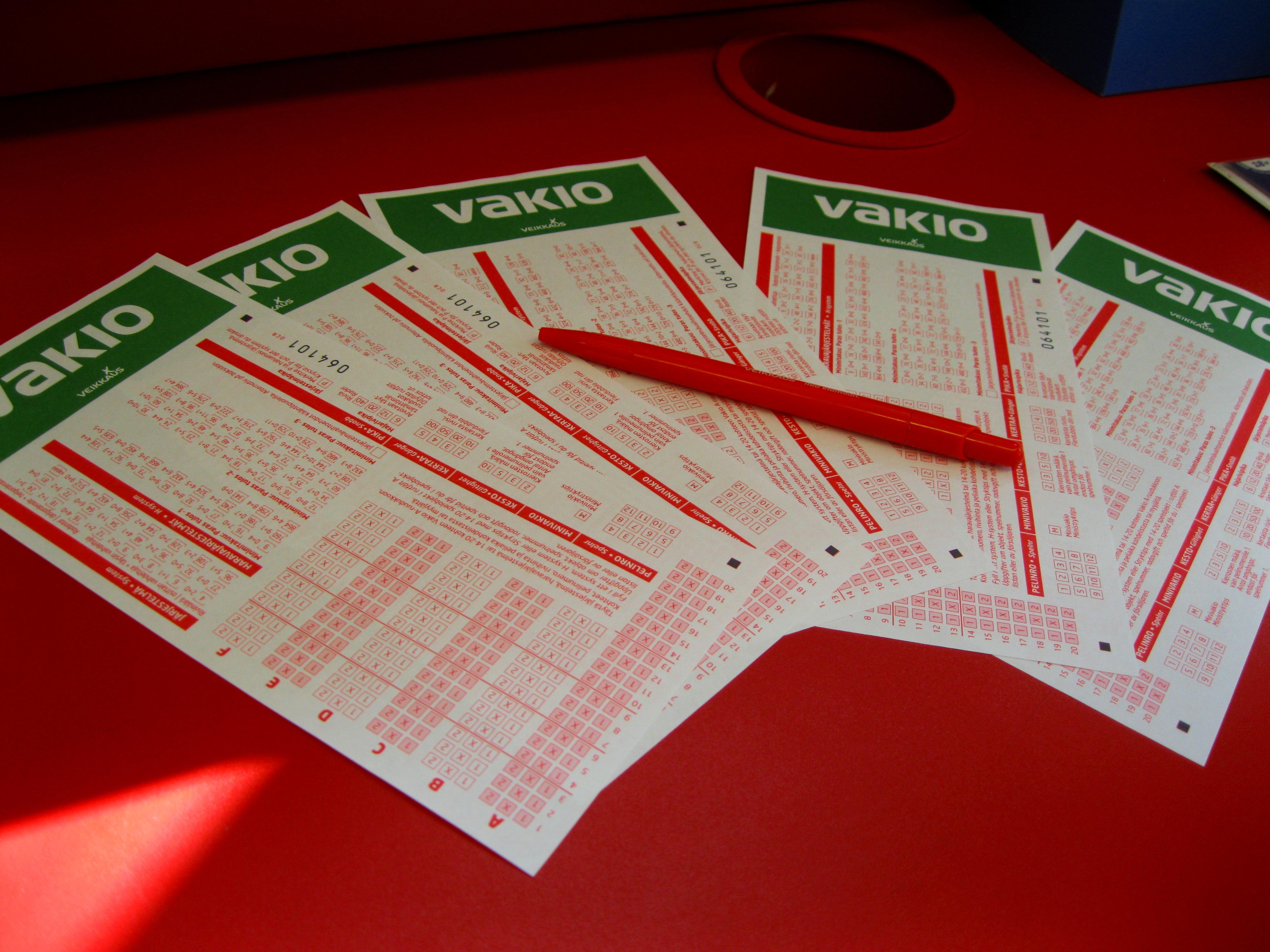 Veikkauksen Vakion pelikuponkeja.